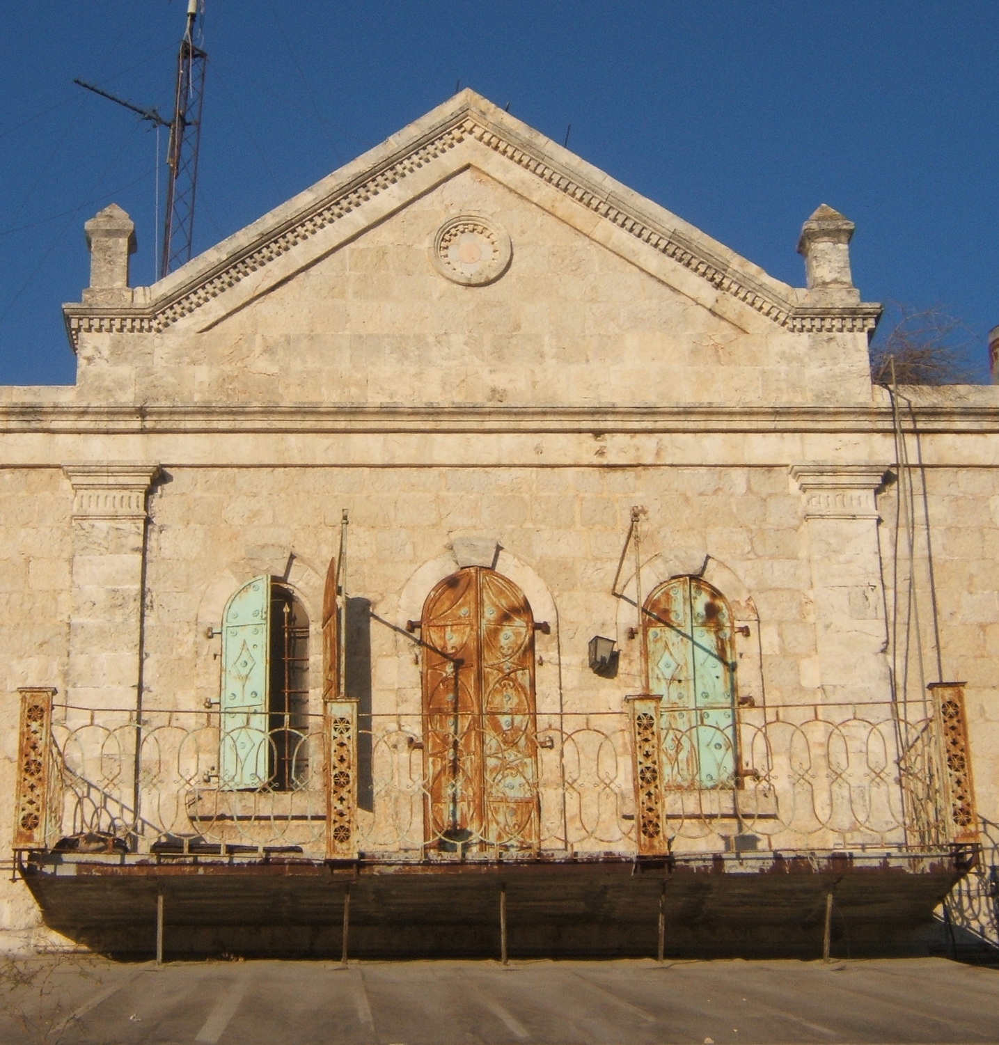 First Mahanaim House, Jerusalem